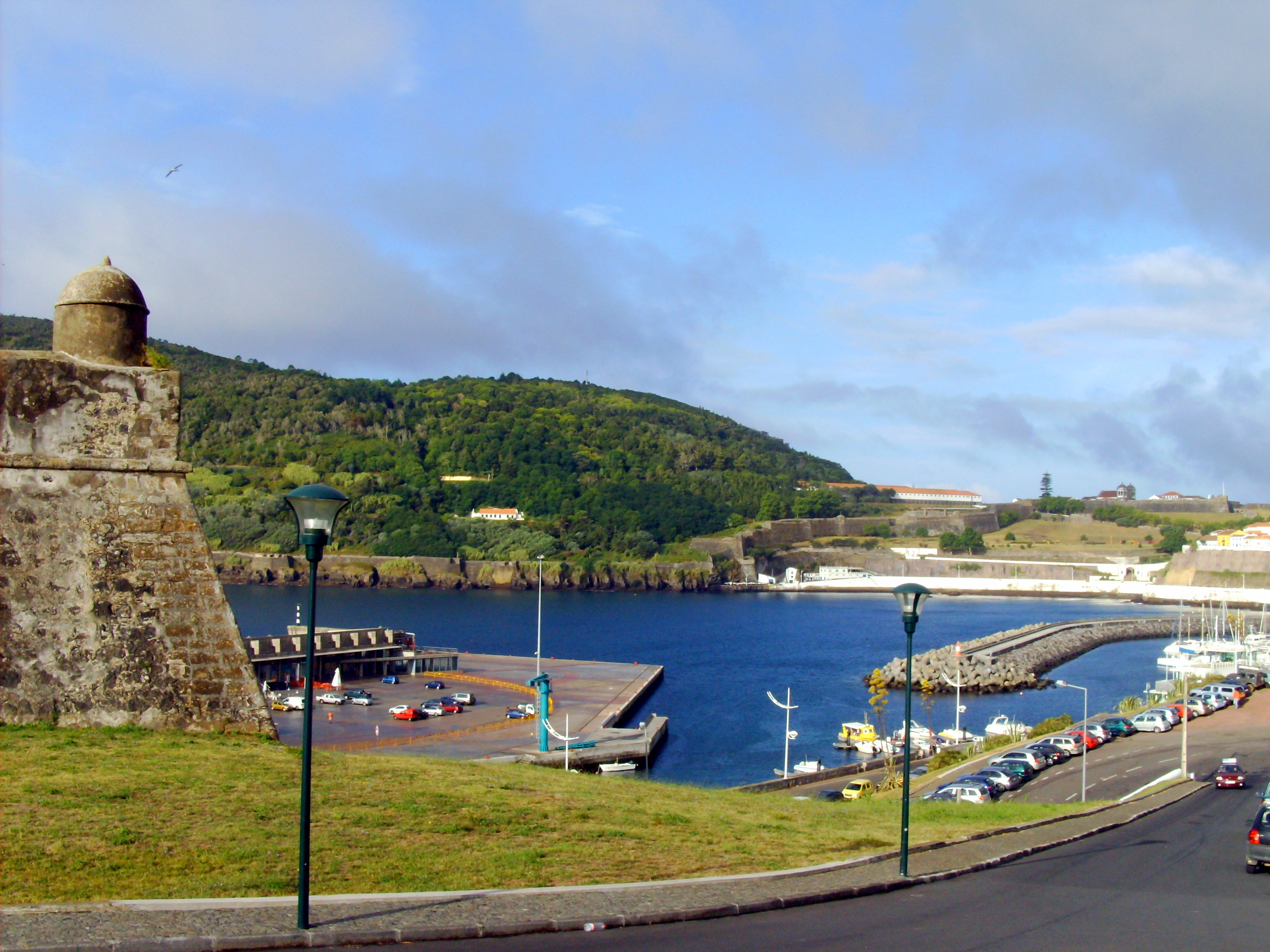 Forte de São Sebastião, freguesia de Nossa Senhora da Conceição, cidade e concelho de Angra do Heroísmo, ilha Terceira, Açores: aspecto de um baluarte; ao fundo, o Monte Brasil.